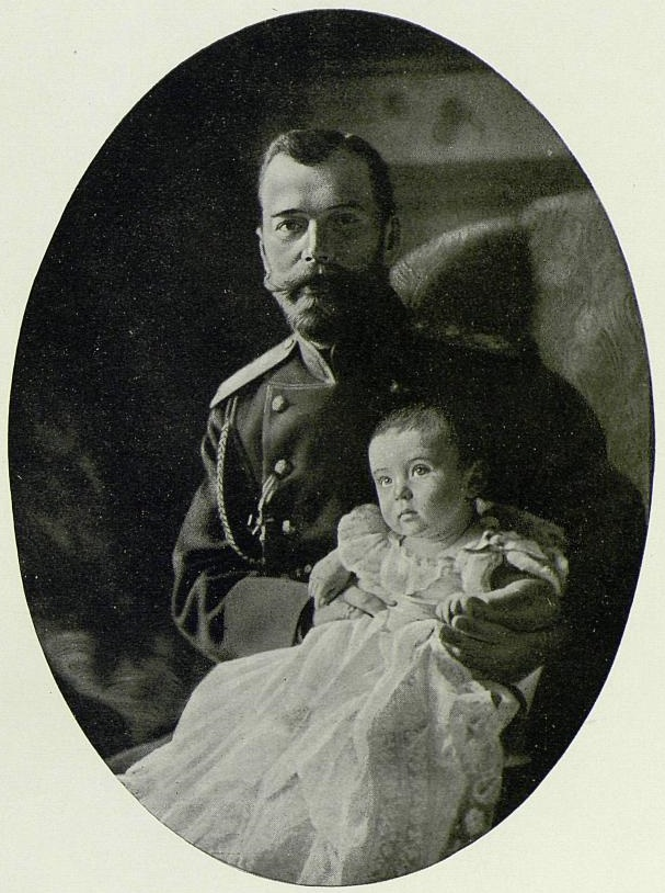 Государь Император Николай Александрович и Наследник Цесаревич Алексей Николаевич